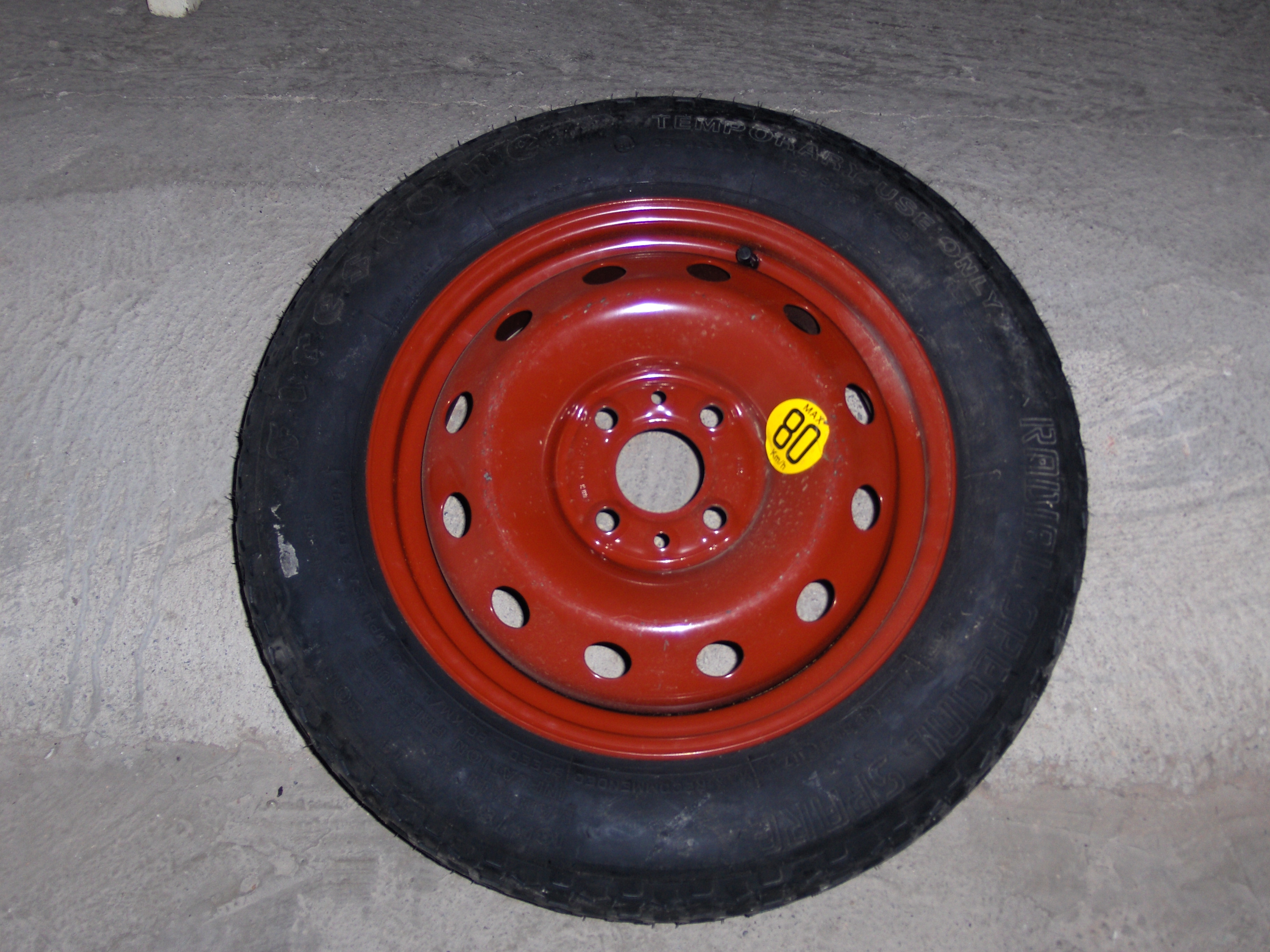 rueda de repuesto de emergencia. Emergency spare wheel. 135/80 R14